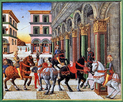 Een Noord-Italiaans riddergezelschap nadert een palazzo. Miniatuur (detail) in Giovanni Boccaccio's Filocolo, geschreven in opdracht van Ludovico iii Gonzaga, Mantua, 1463-64. Oxford, Bodleian Library, Ms. Canon. Ital. 85, fol. 114v